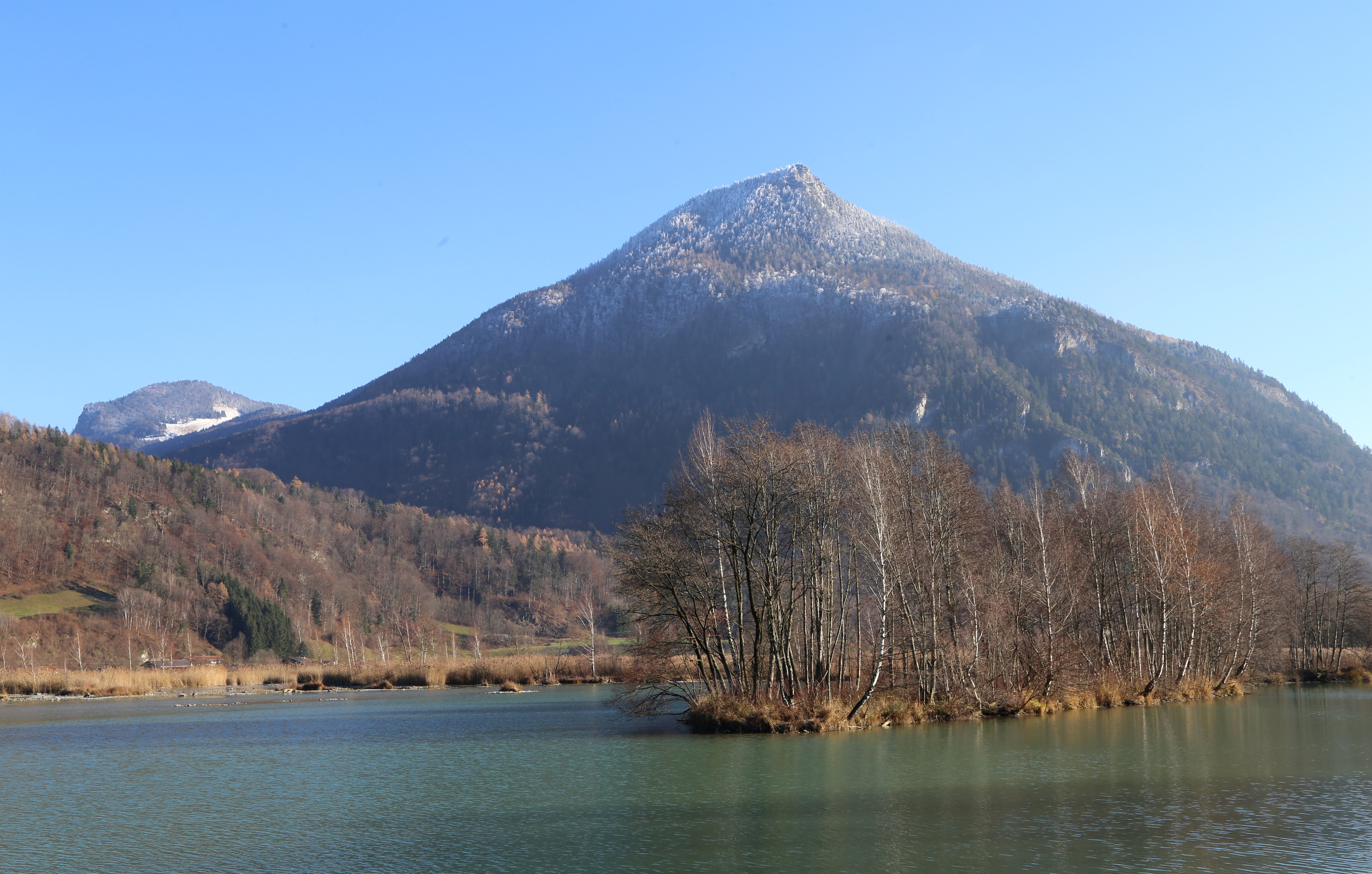 Innstausee (eine weitgehend vom Flusslauf getrennte Bucht des Inns), Zugang über Fischbach, Flintsbach am Inn; liegt auf dem Gemeindegebiet von Nußdorf am Inn. Landschaftsschutzgebiet Inntal Süd (LSG-00595.01)